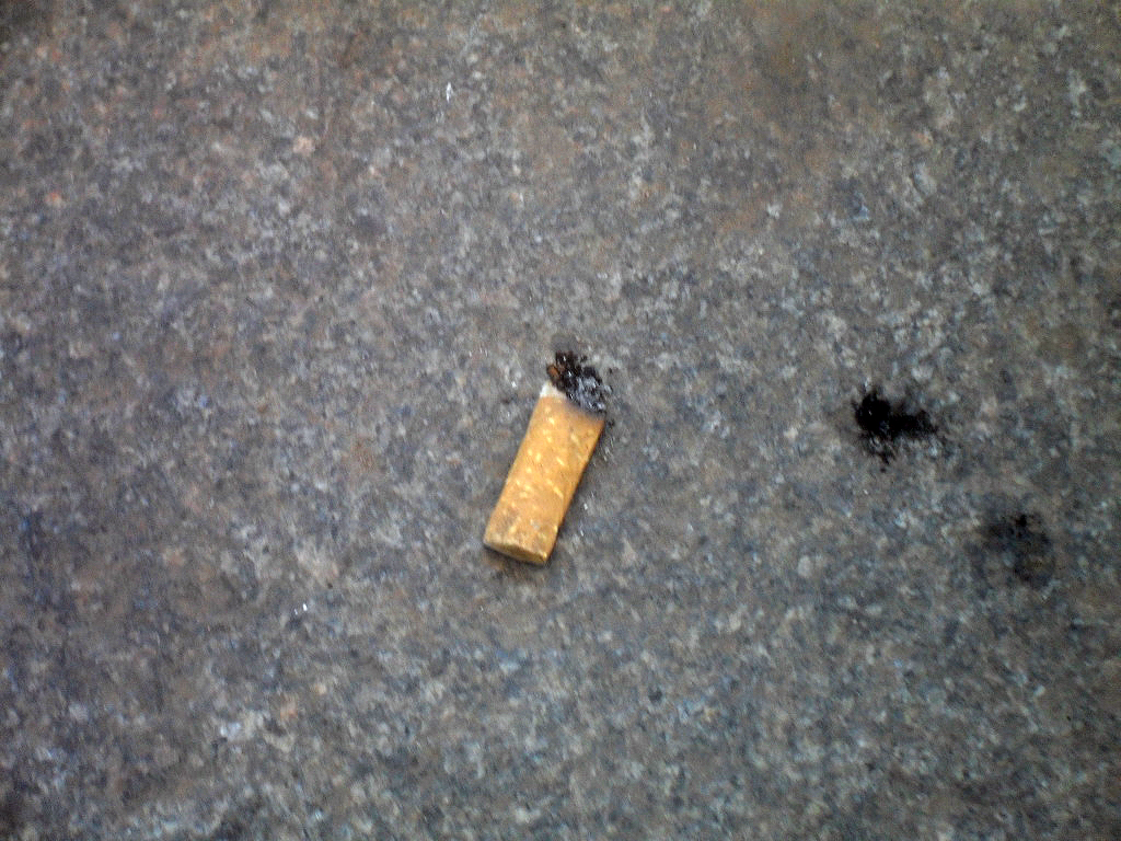 En fimp